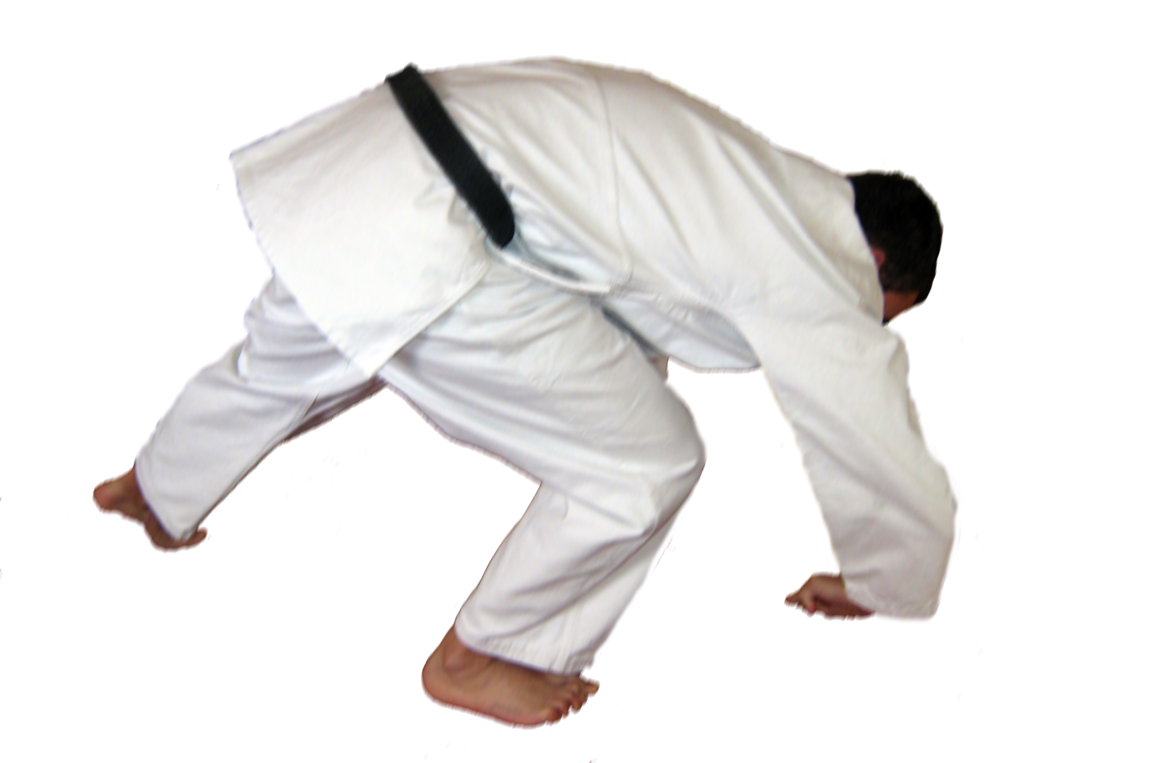 Mae maware Ukemi, Vorwärtsrolle Judo